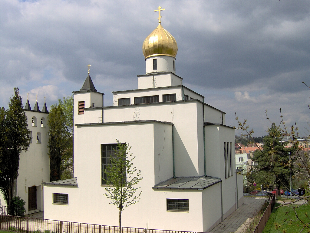 A další foto pravoslavného kostela Sv. Václava v Brně